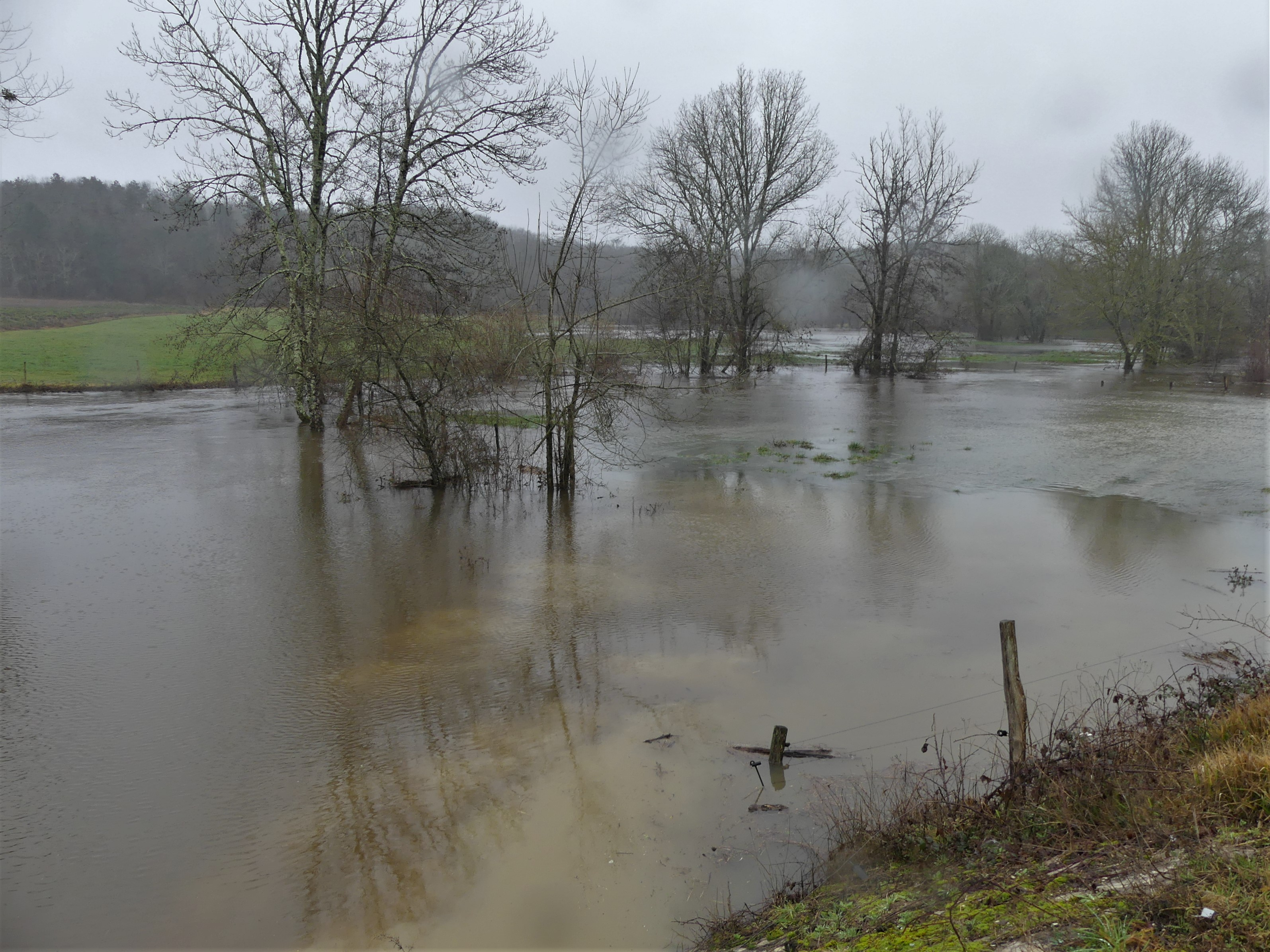 Le Bandiat en crue au sud du lieu-dit la Renardière, en limite des communes de Lussas-et-Nontronneau et Javerlhac-et-la-Chapelle-Saint-Robert, Dordogne, France. Vue prise en direction de l'aval.